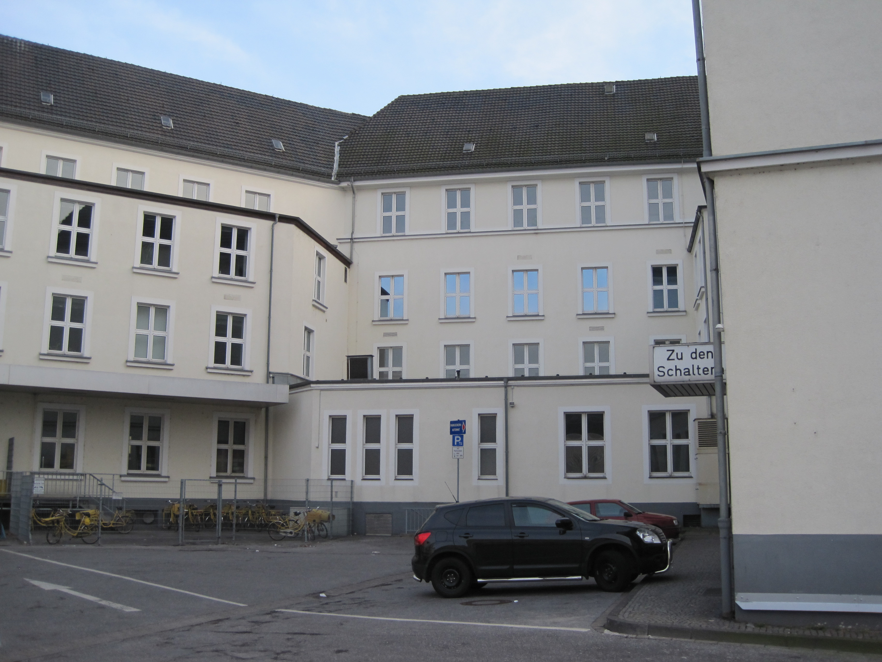 Das Foto zeigt den Post-Zustellstützpunkt, Teil des Technischen Rathauses Hamm.